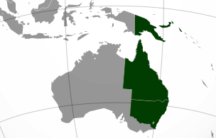 Ендемизам Extatosoma tiaratum